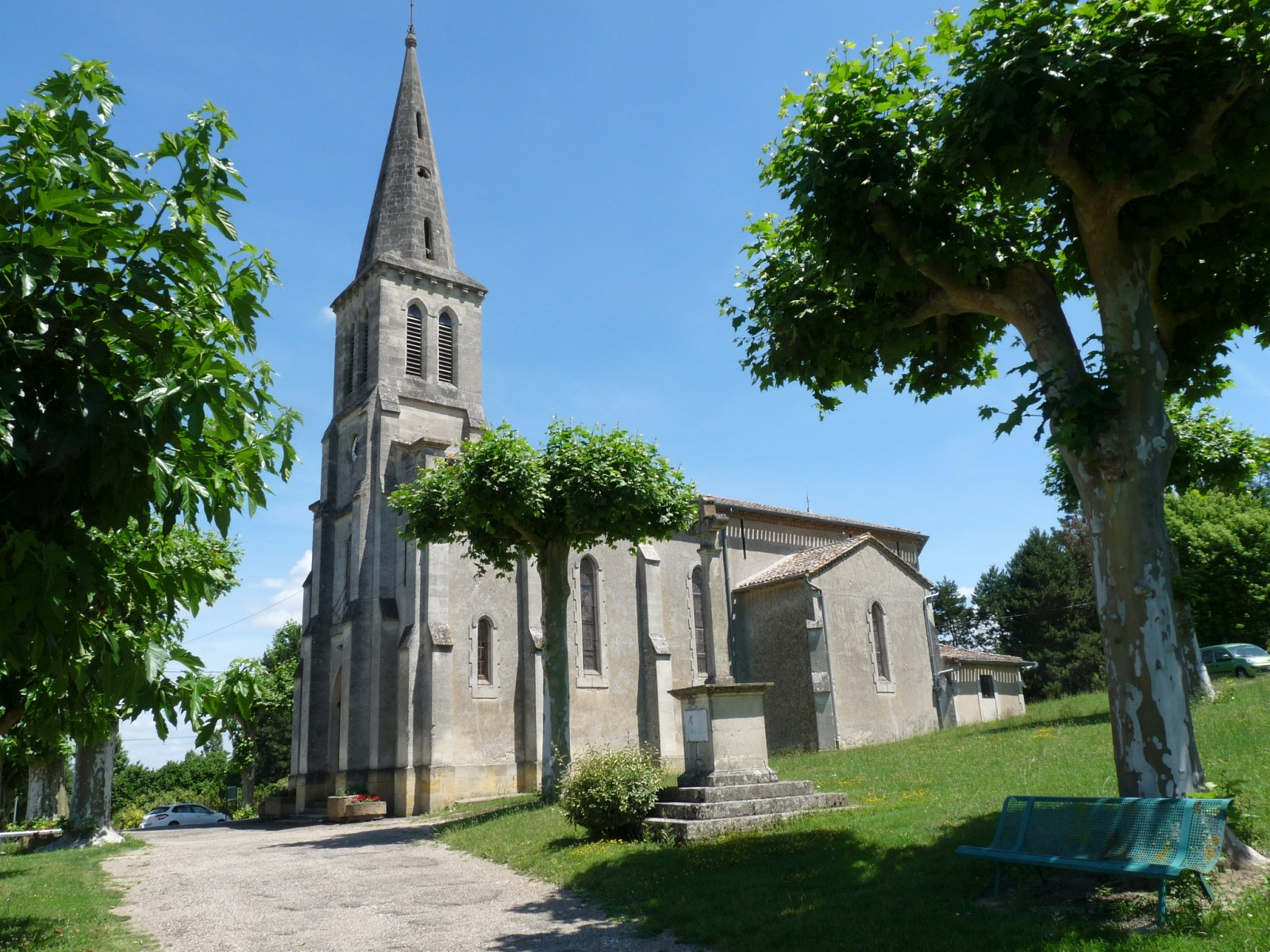 Eglise de Pineuilh, Gironde, France